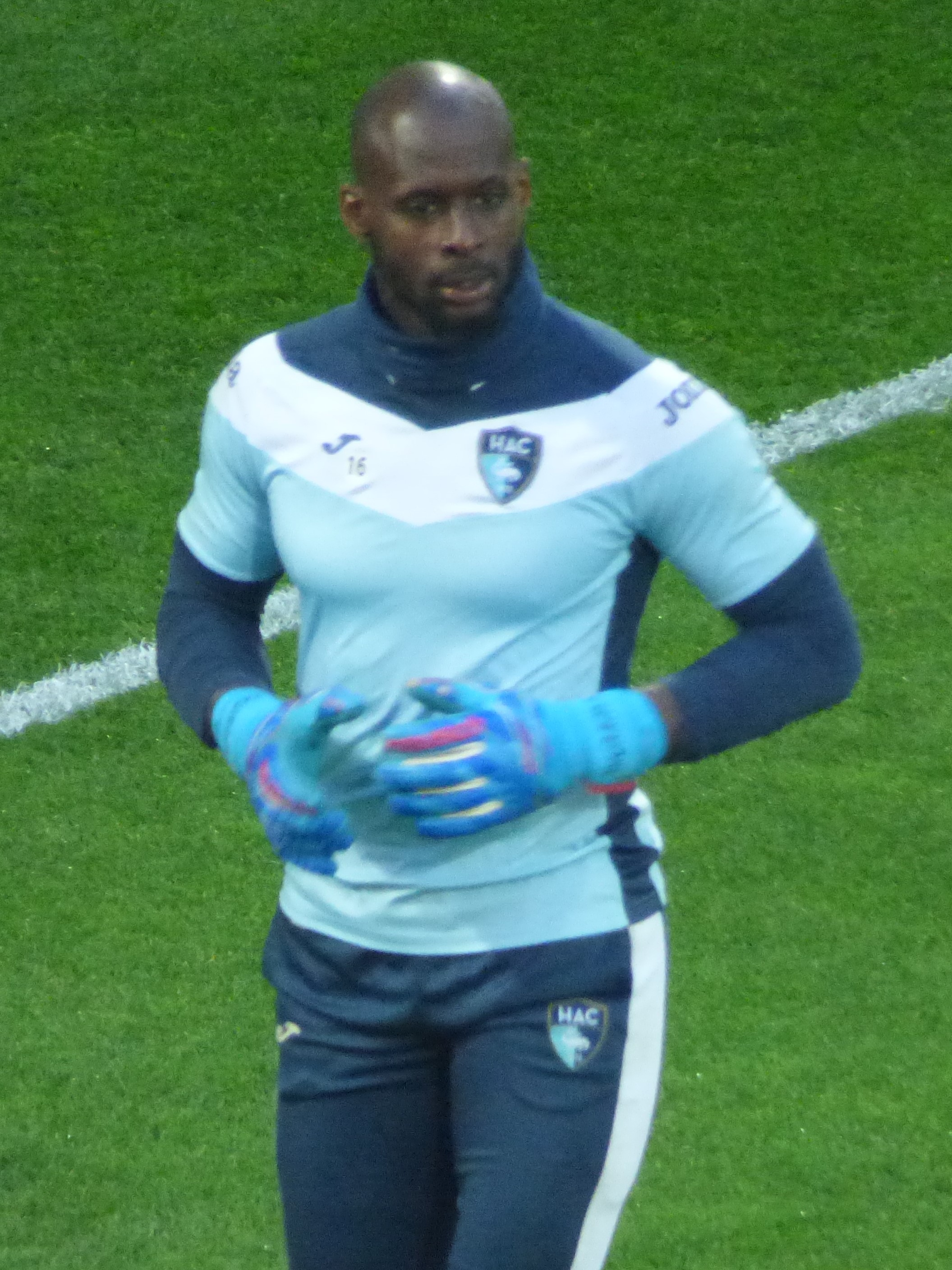 Yohann Thuram avant le match Lens / Le Havre, comptant pour la 30ème journée du championnat de France de Ligue 2 2018-2019, le 1er avril 2019 au Stade Bollaert-Delelis.